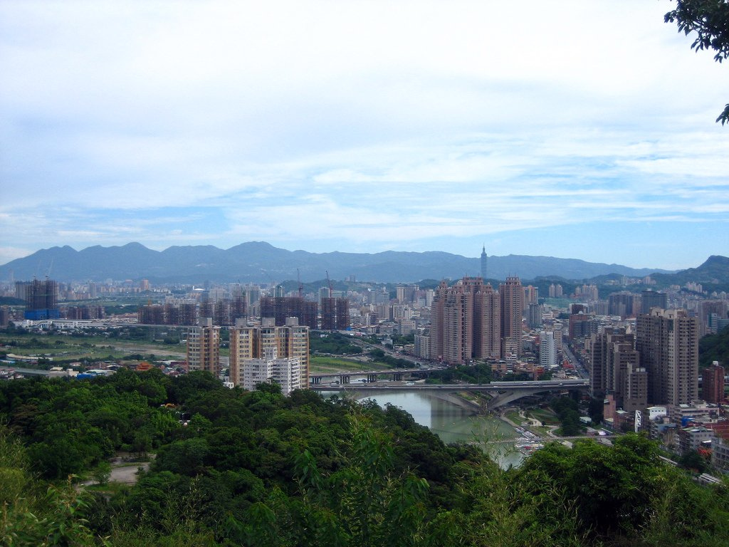 中文（台灣）: 新店鳥瞰。